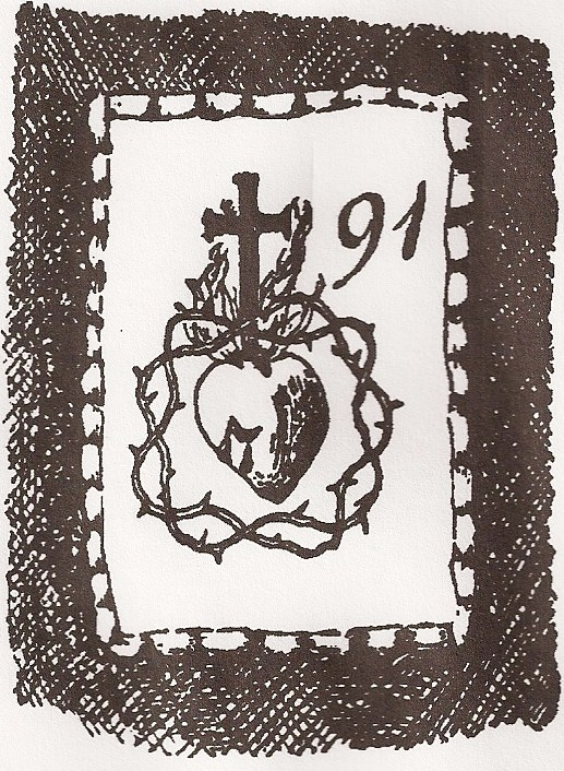 "L'emblême du Coeur de Jésus", dessin réalisé par Victoire de Saint-Luc, à l'origine de sa condamnation à mort et de celle de membres de sa famille